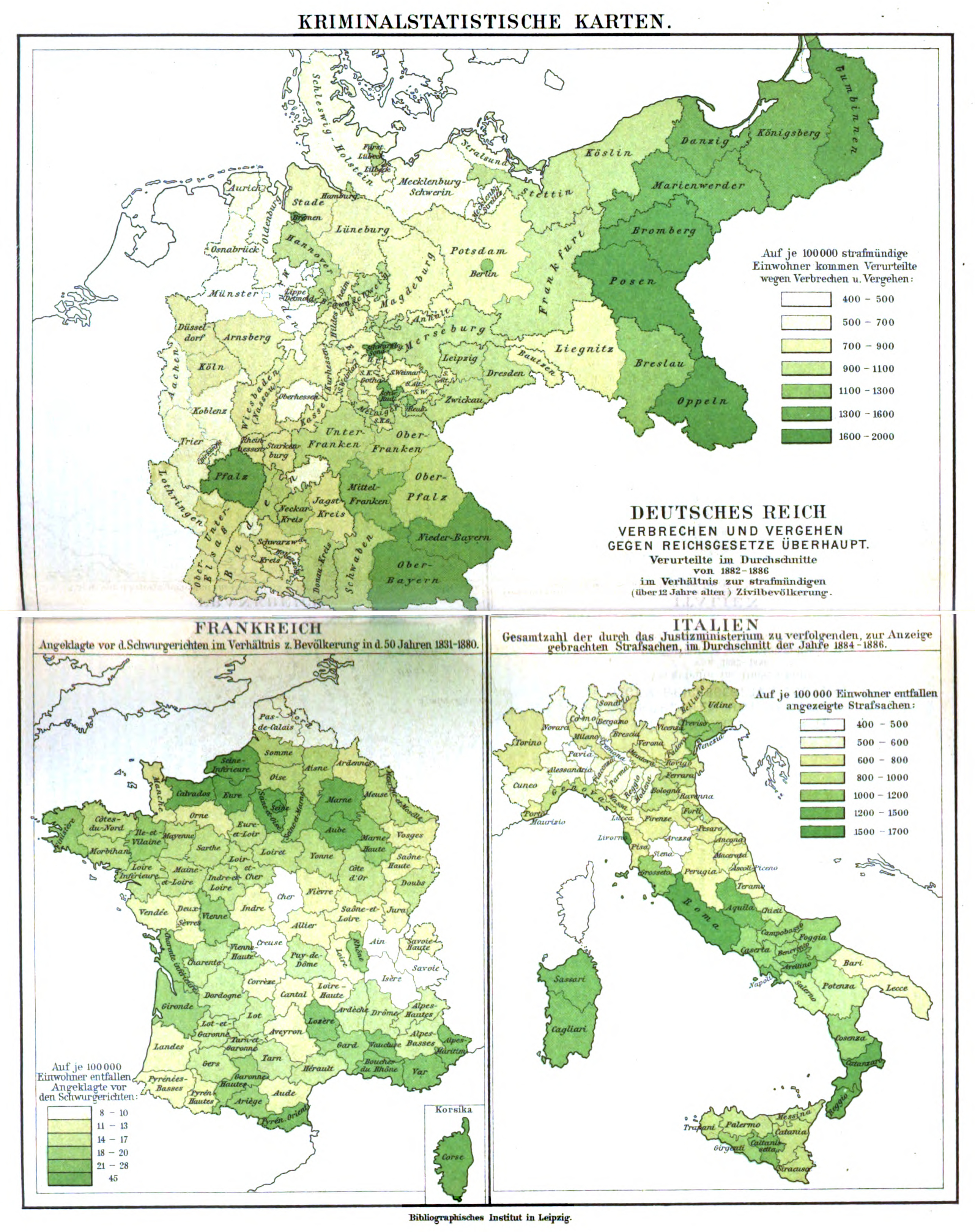 „Kriminalstatistische Karten“ zum Artikel „Kriminalität“ oben: Deutsches Reich. Verbrechen und Vergehen gegen Reichsgesetze überhaupt. Verurteilte im Durchschnitte von 1882–1886 im Verhältnis zur strafmündigen (über 12 Jahre alten) Zivilbevölkerung. unten links: Frankreich. Angeklagte vor d. Schwurgerichten im Verhältnis z. Bevölkerung in d. 50 Jahren 1831–1880. unten rechts: Italien. Gesamtzahl der durch das Justizministerium zu verfolgenden, zur Anzeige gebrachten Strafsachen, im Durchschnitt der Jahre 1884–1886.